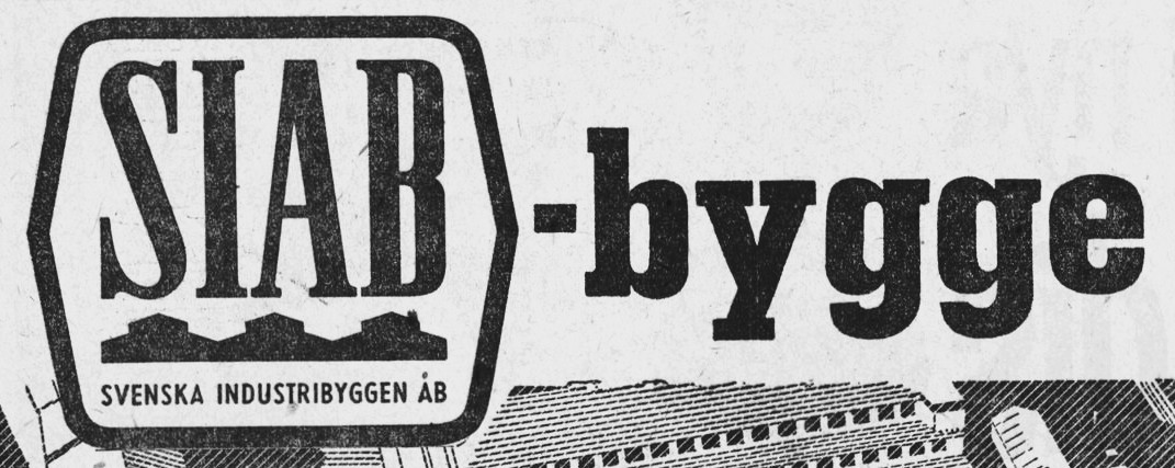 Annons för Svenska Industribyggen AB (SIAB)